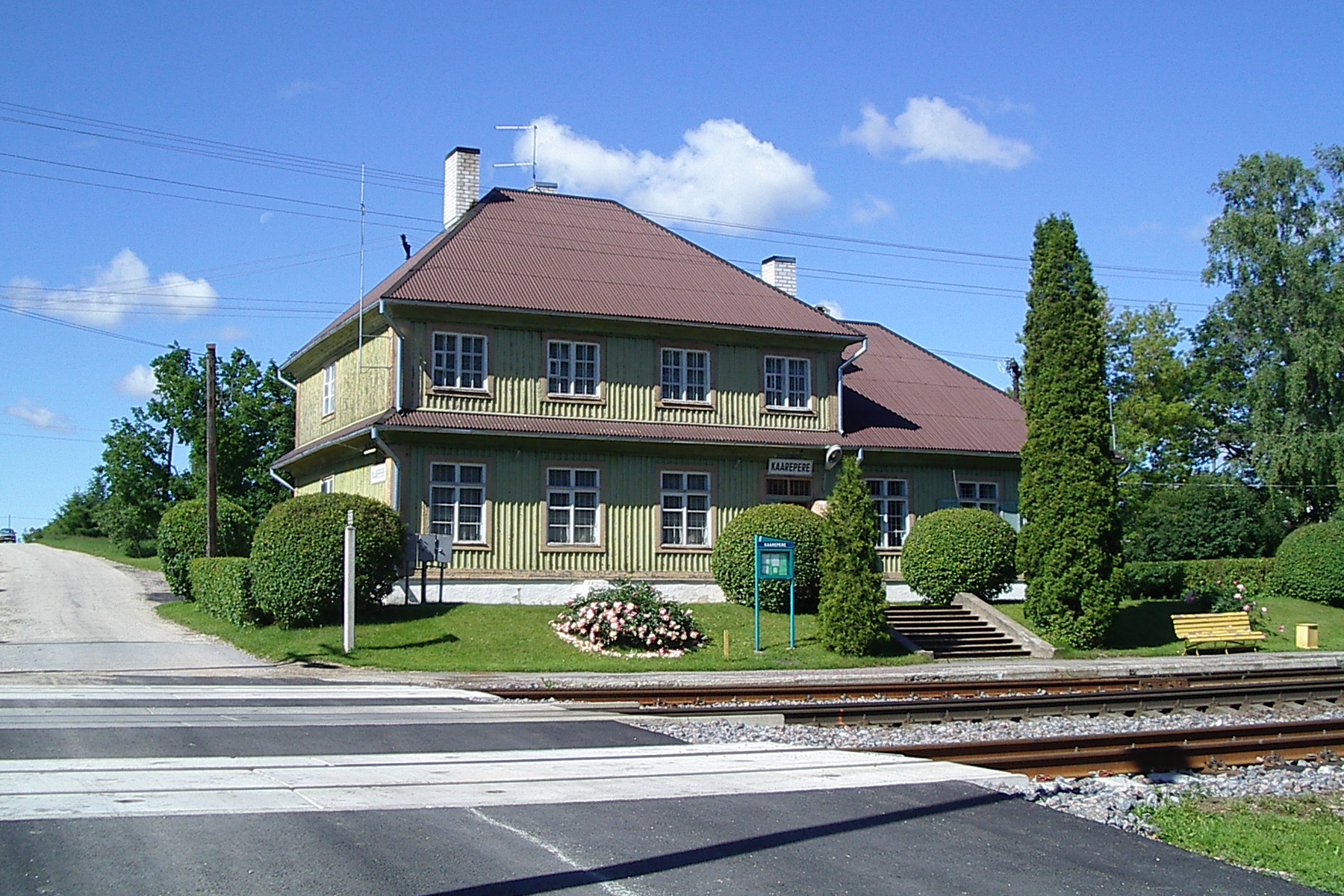 Kaarepere raudteejaam